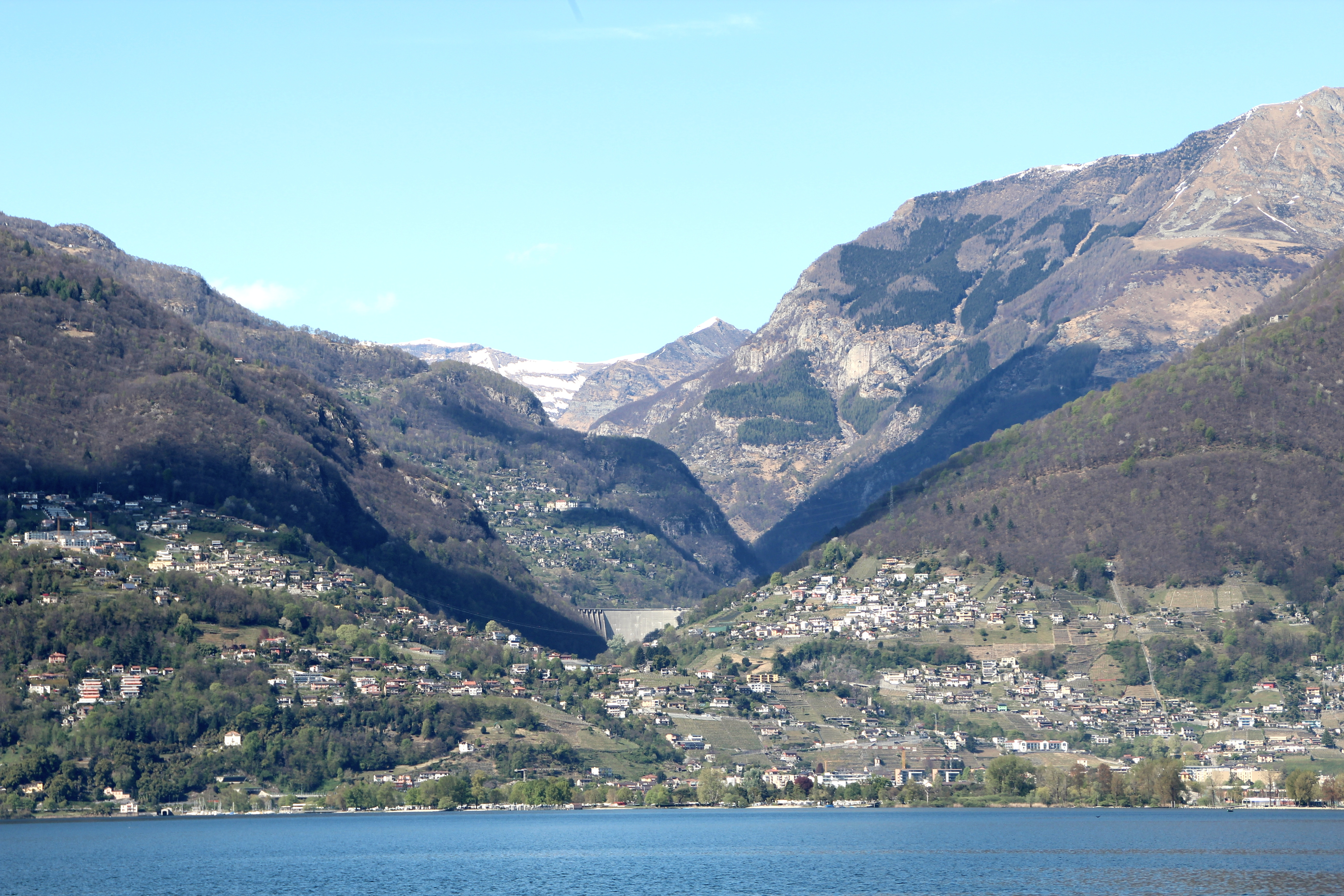 Blick ins Valle Verzasca